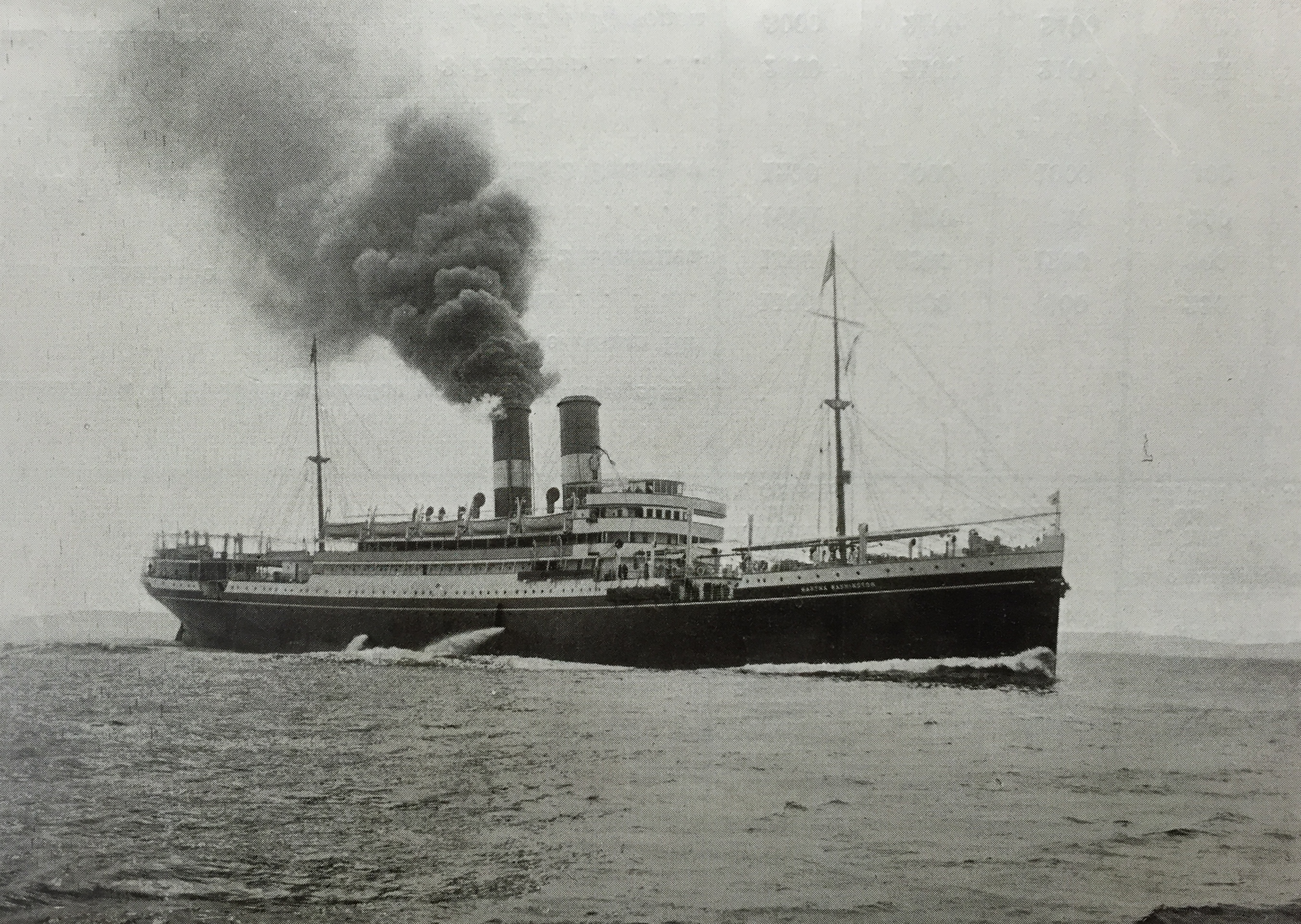 Dampfschiff in Fahrt